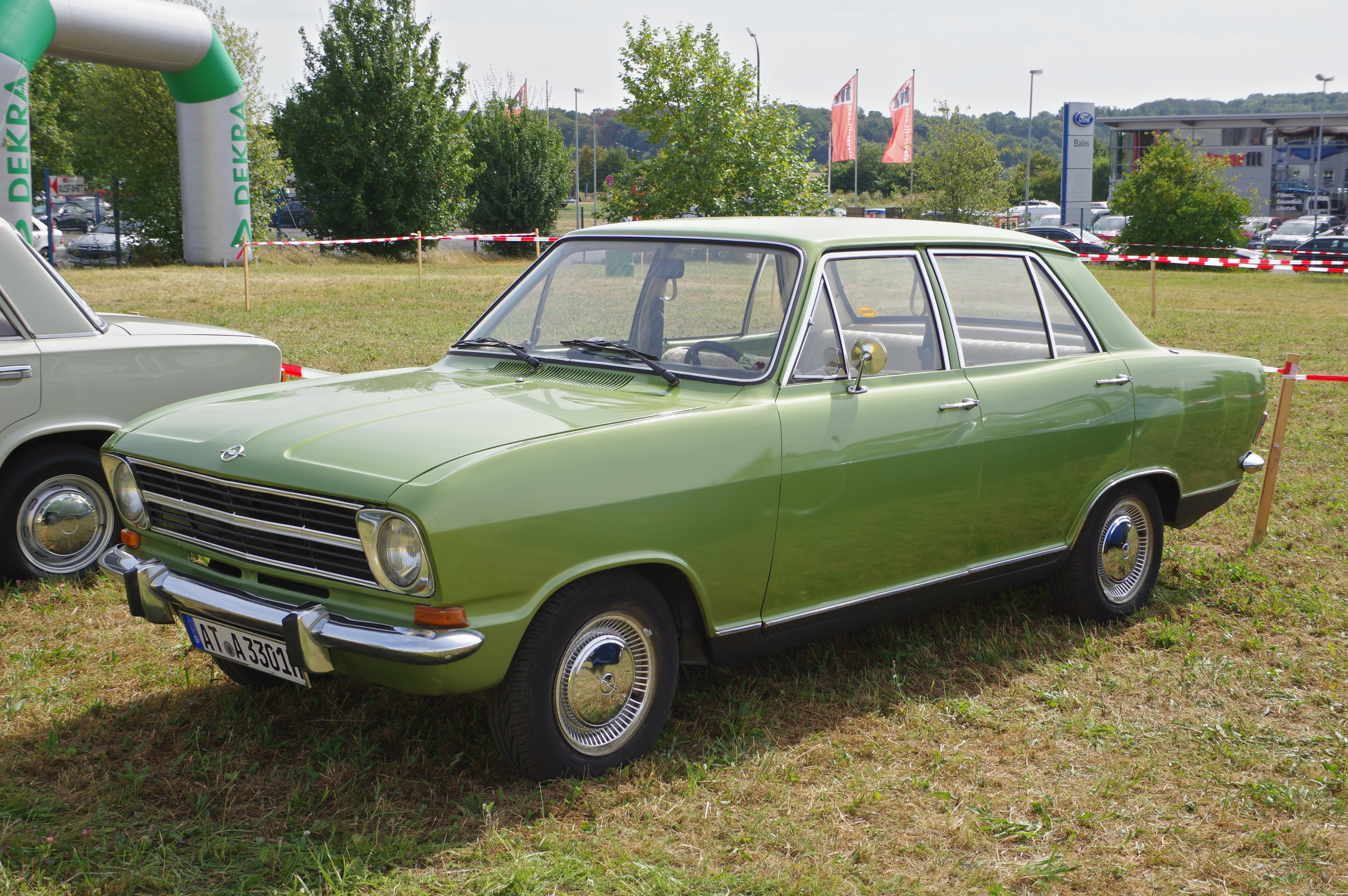 Opel Kadett B , Bitburg Classic 2016